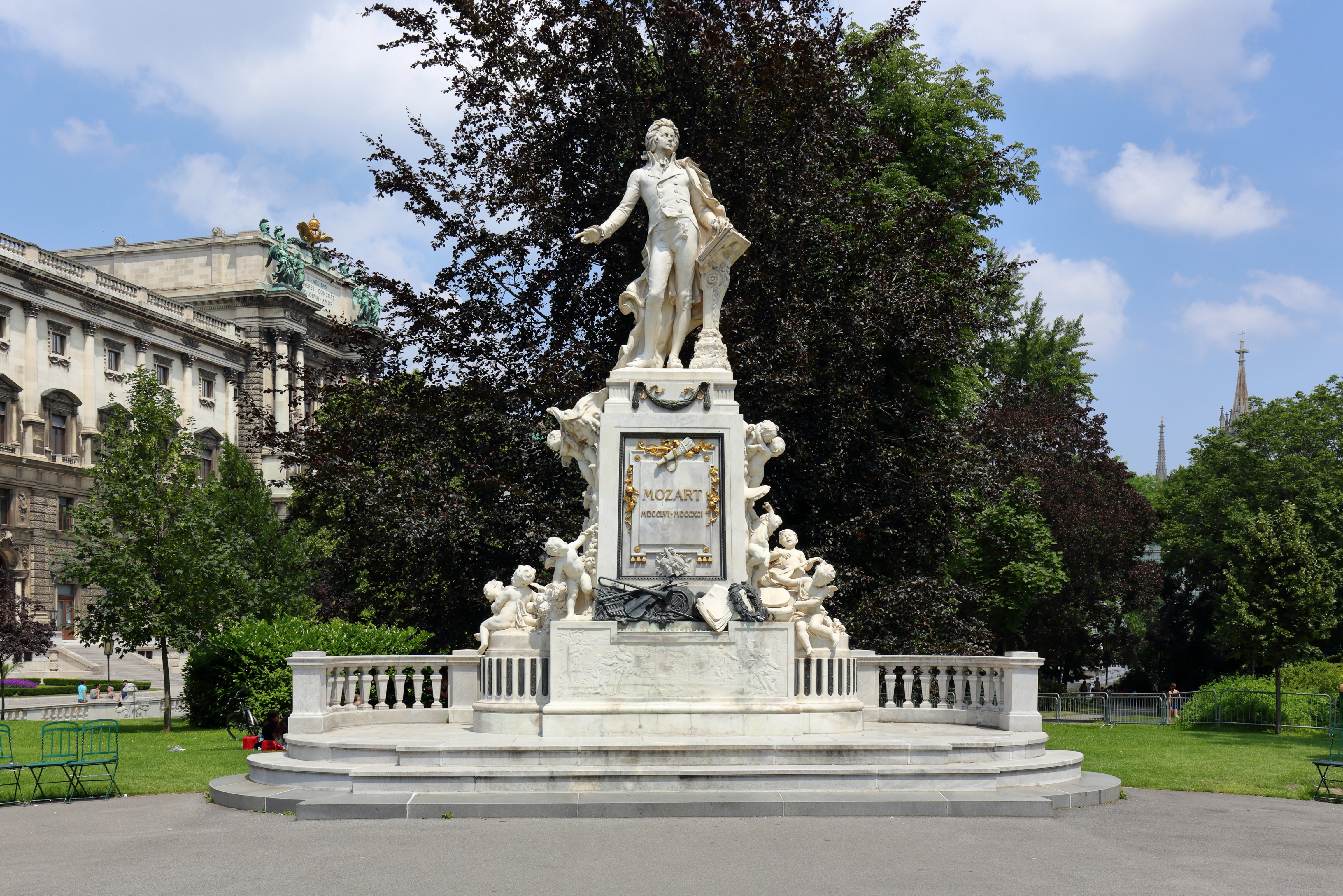 Das Mozartdenkmal im Burggarten im 1. Wiener Gemeindebezirk Innere Stadt.Das 7,5 Meter hohe Monument wurde von dem Architekten Karl König und dem Bildhauer Viktor Tilgner geschaffen und am 21. April 1896 auf dem Albrechtsplatz (heute Albertinaplatz) enthüllt. Nach dem II. Weltkrieg und Wiederinstandsetzung wurde es 1953 im Burggarten aufgestellt.Dargestellt ist der Komponist mit Notenpult auf einem Sockel, der mit Ornamenten, Masken und Kränzen geschmückt ist und von einer halbkreisförmigen Balustrade aus grobem Sterzinger Marmor (Südtirol) umrahmt wird. Auf dem vorderen Flachrelief ist die Einladung und das Erscheinen des Steinernen Gastes aus der Oper „Don Giovanni“ dargestellt und auf dem rückseitigen Hochrelief der sechsjährige Komponist am Klavier, sein Vater mit der Geige und seine Schwester Nannerl.